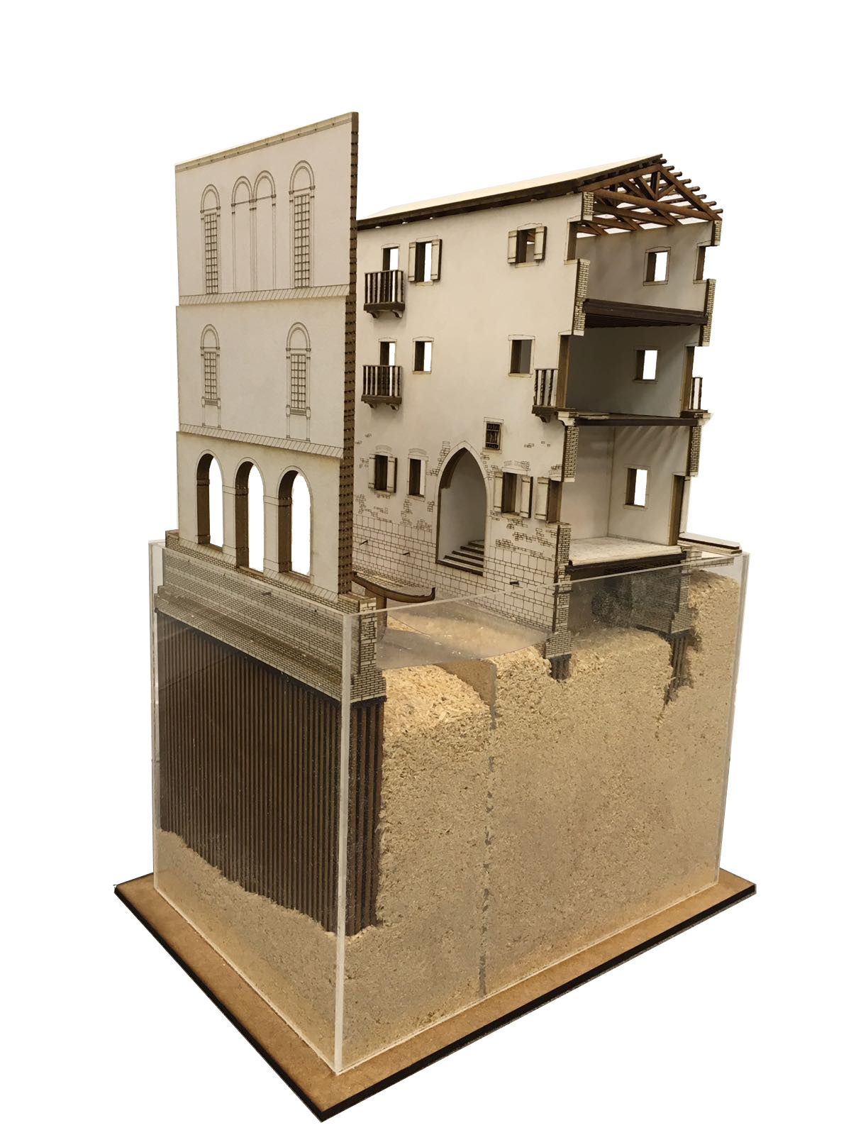 Veneziar etxebizitza eraikuntza baten zimentazio maketa